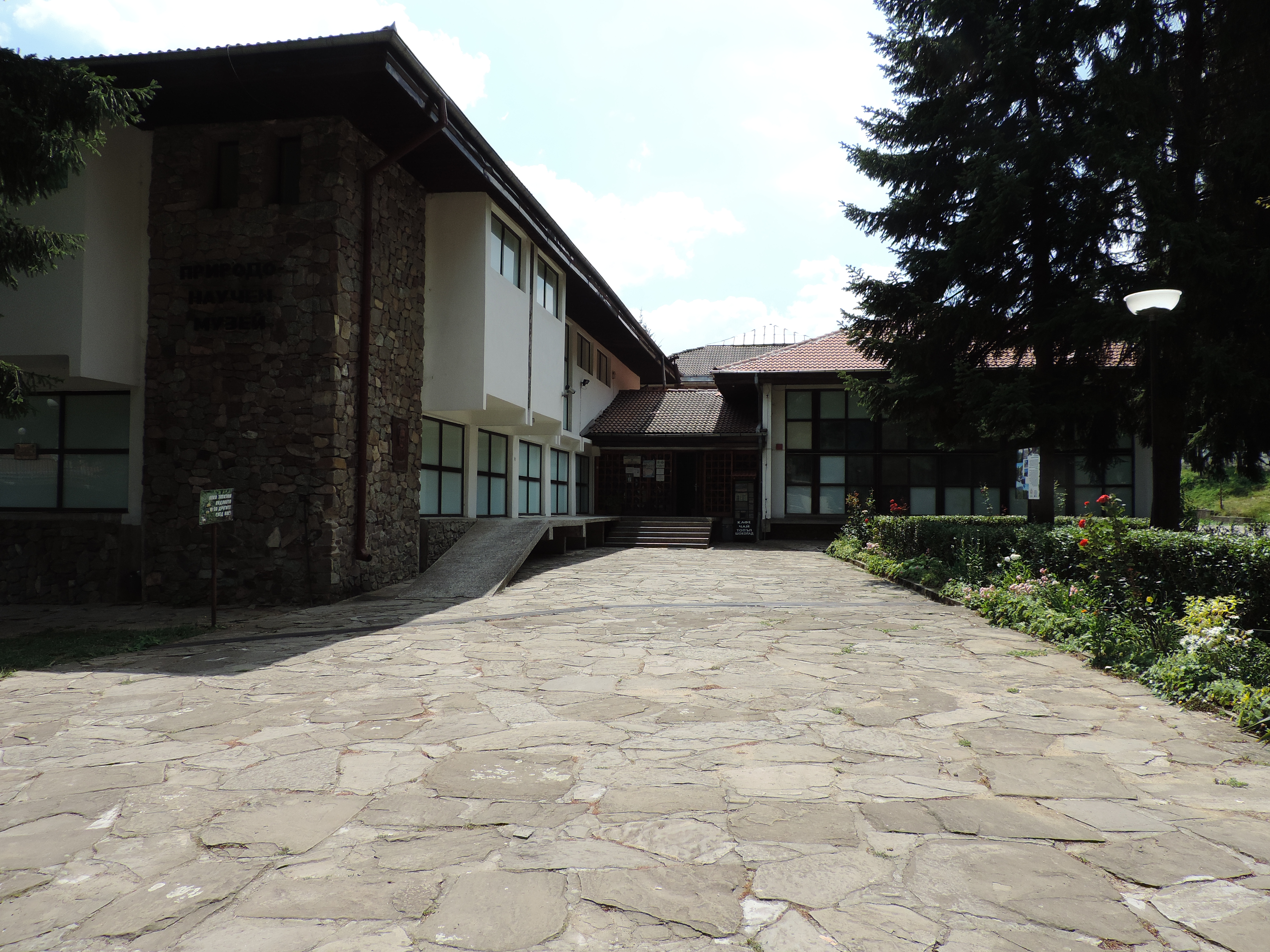 Природонаучният музей в Черни Осъм.